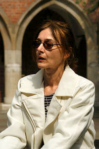 Elżbieta Wojnarowska, pisarka.